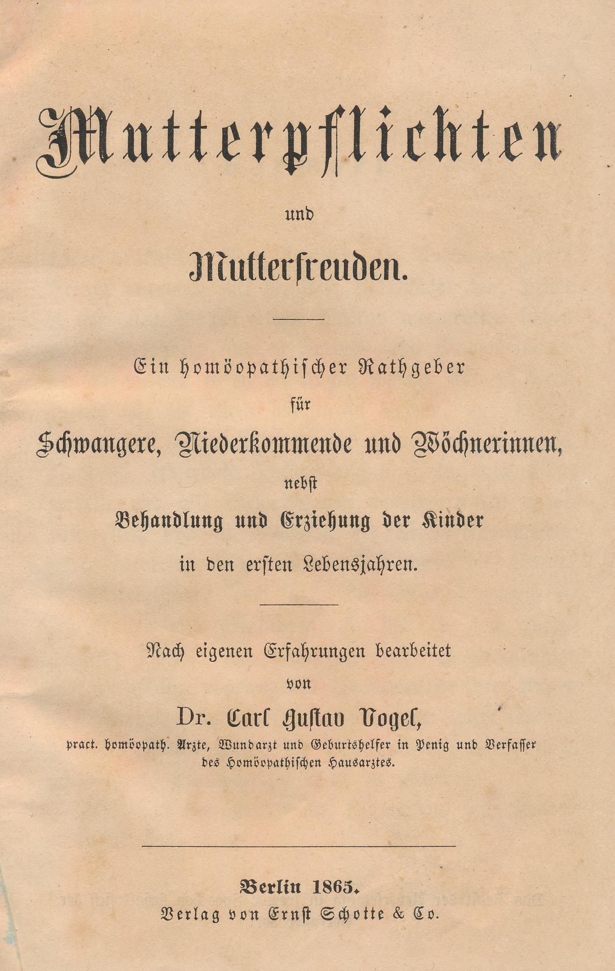 Dr. Carl Gustav Vogel: Mutterpflichten und Mutterfreuden, Berlin 1865